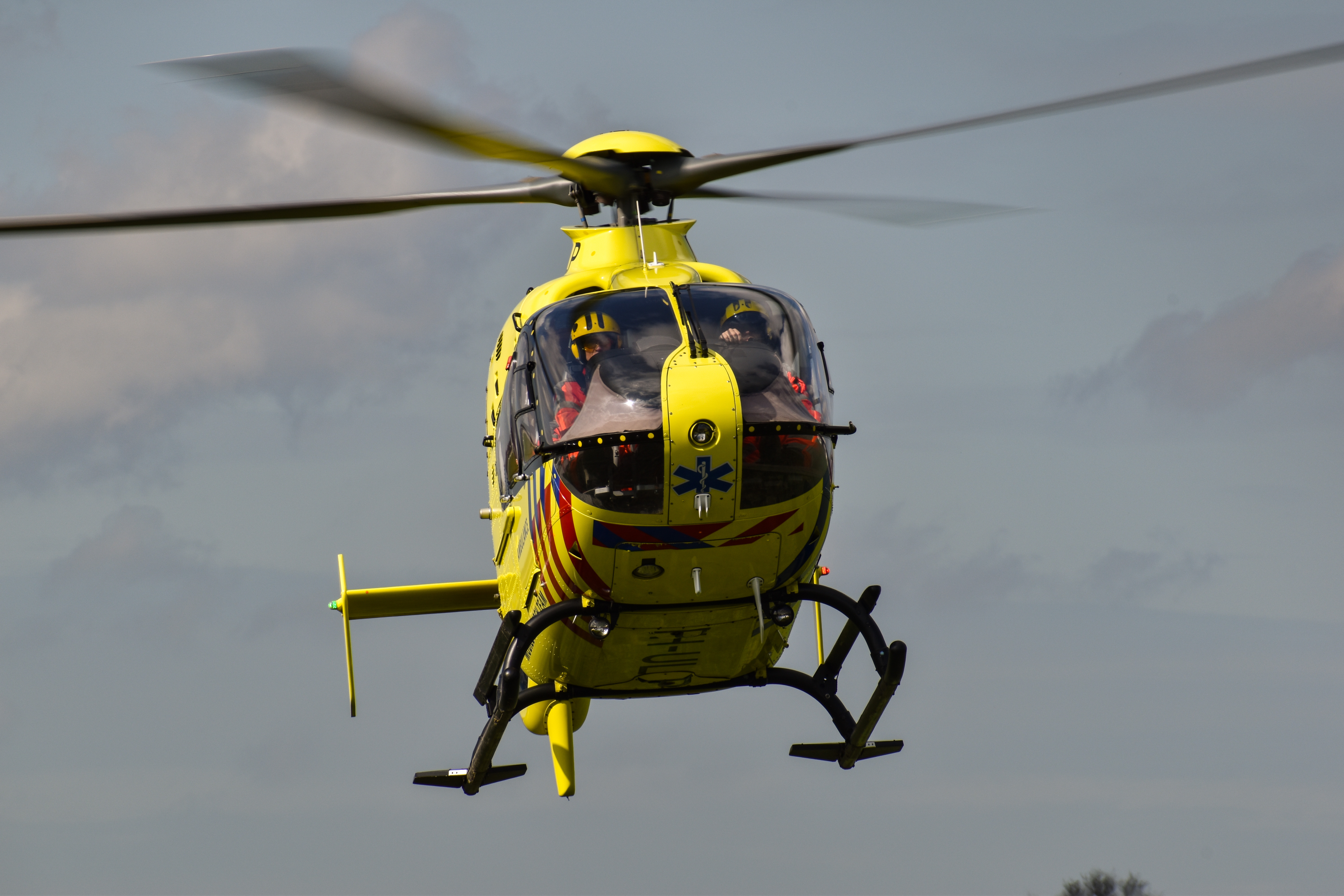 Lifeliner 2 terug van een inzet